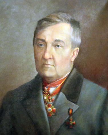 Дмитрий Матвеевич Перевощиков (1788–1880) — ректор Московского университета в 1848–1850 гг.